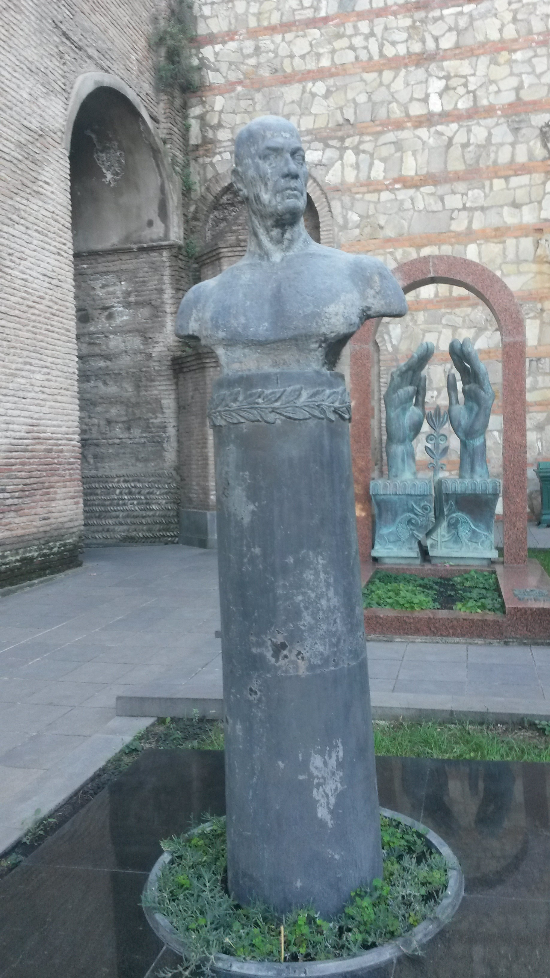 მთაწმინდის პანთეონი